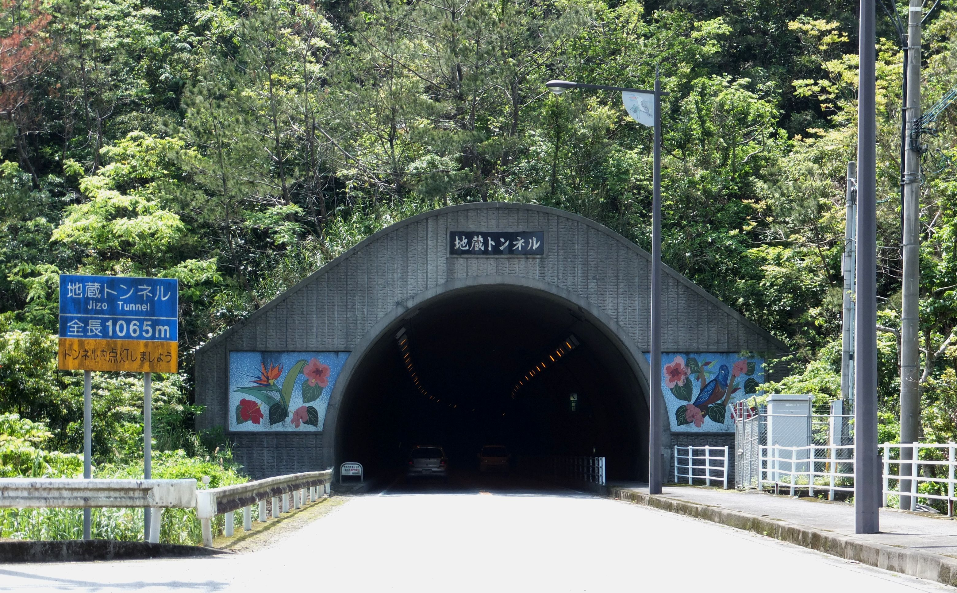 地頭峠の下を通る地蔵峠